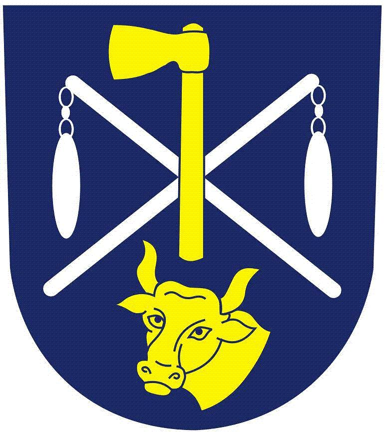 Znak obce Býkov-Láryšov